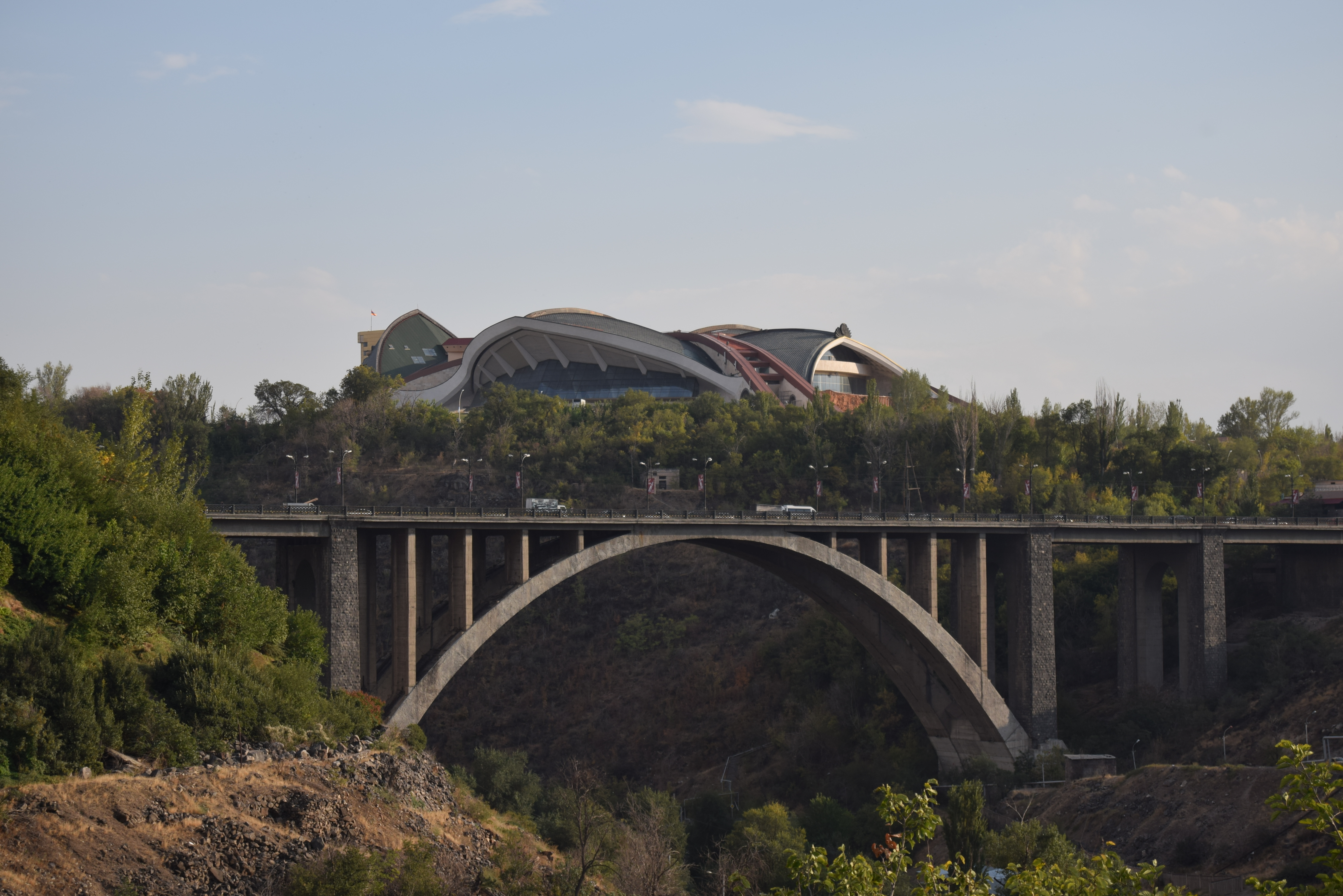 Կարեն Դեմիրճյանի անվան մարզահամերգային համալիր և Կիևյան կամուրջ